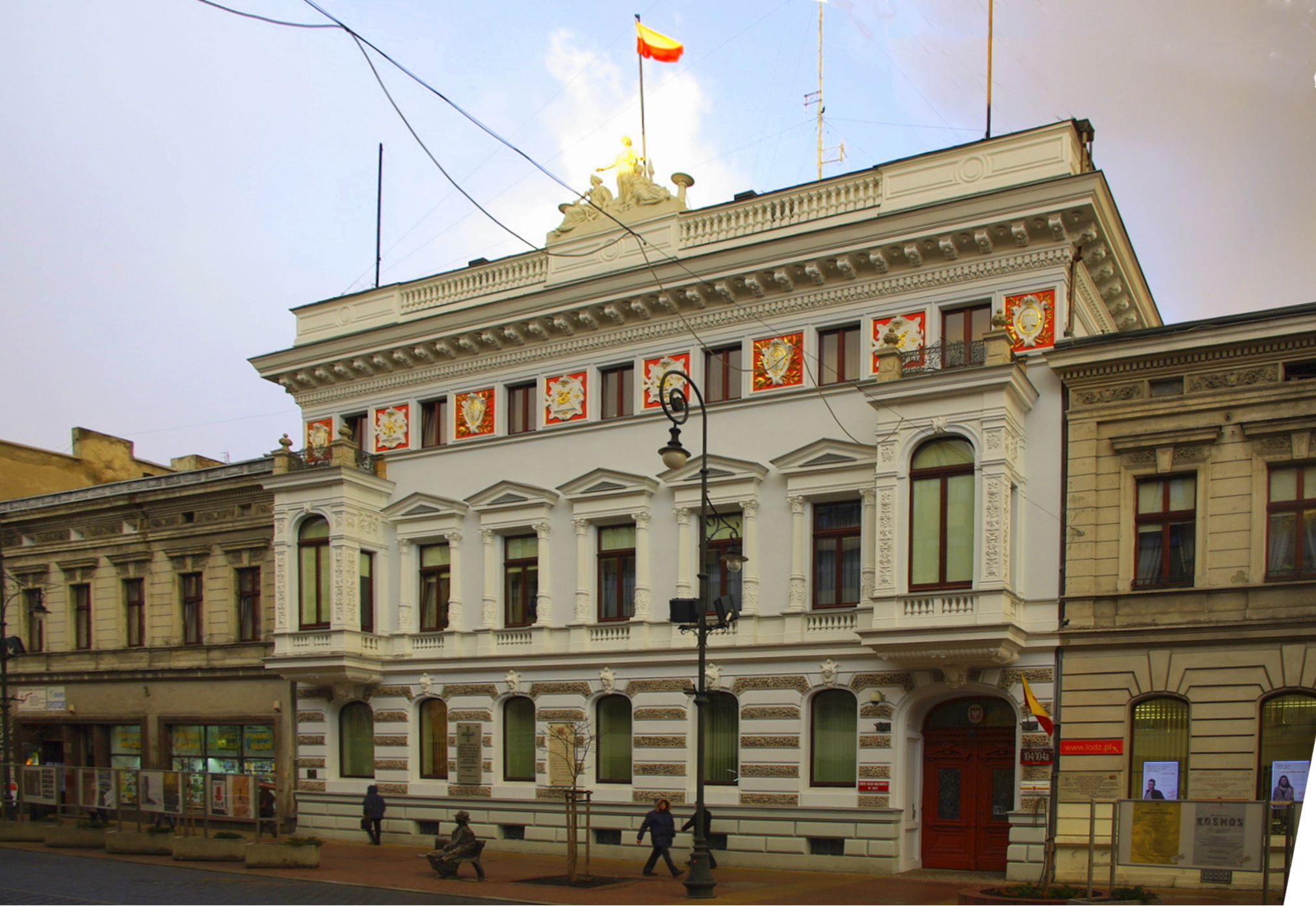 Pałac Juliusza Heinzla, obecnie Urząd Miasta Łodzi - ul. Piotrkowska 104 w Łodzi